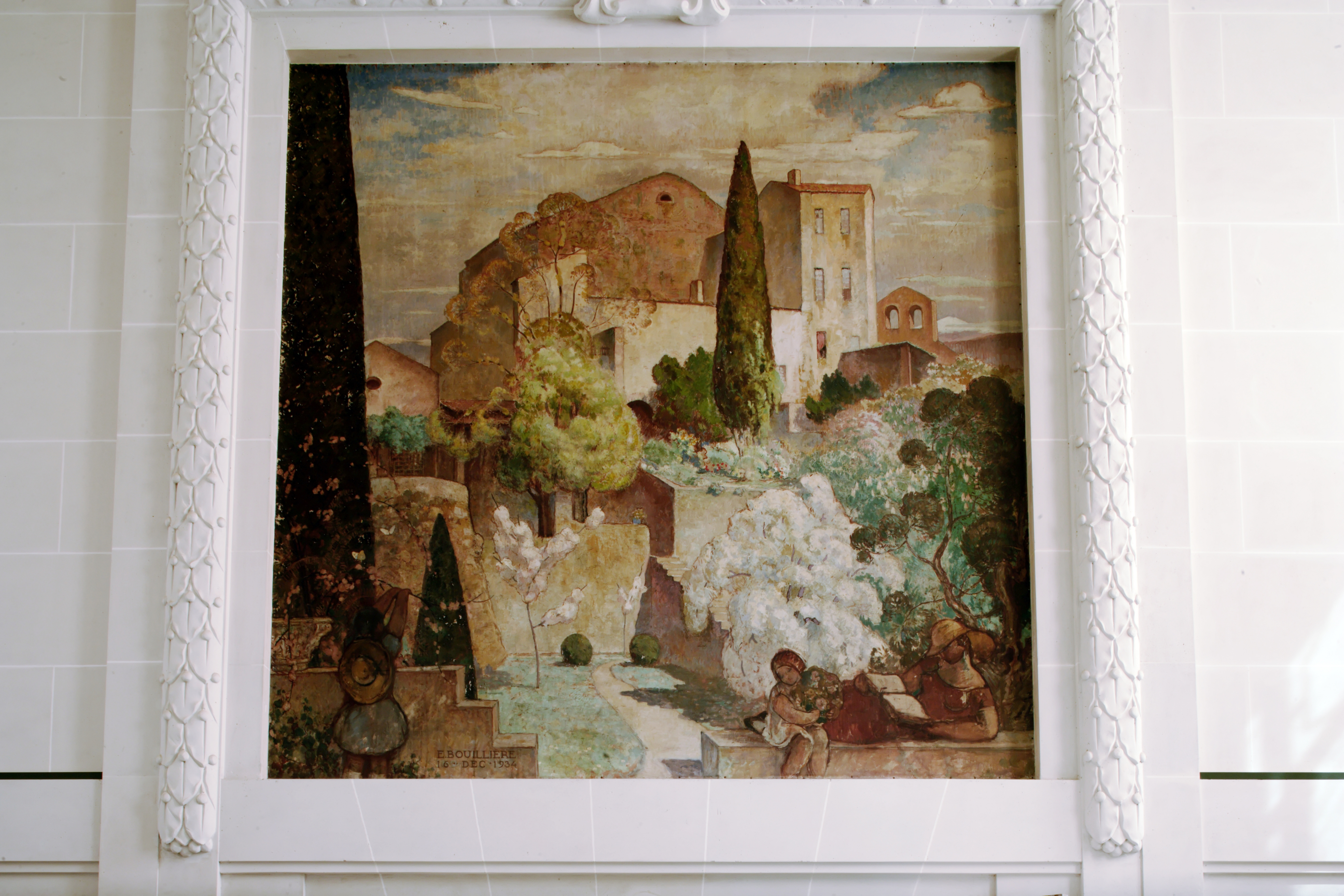 Bibliothèque d'Etude et du Patrimoine, Toulouse.